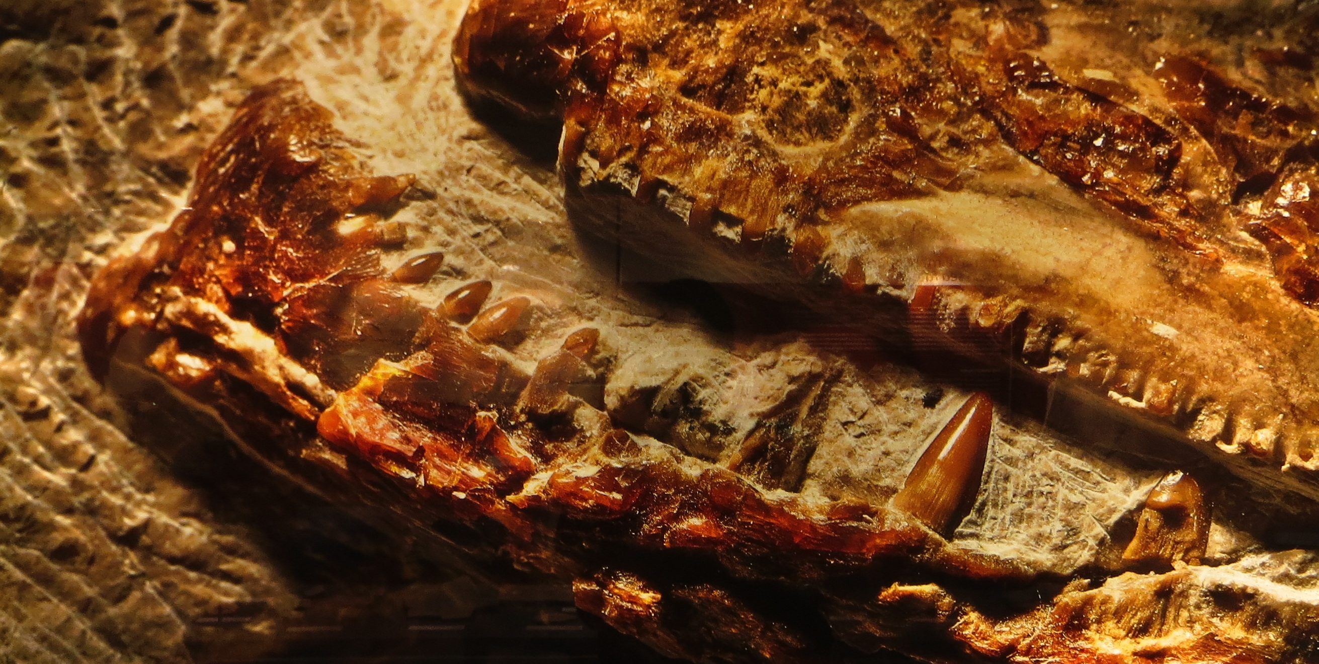 Fossil of Sphyraena- Museo dei Fossili di Bolca